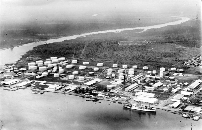 Repronegatief. Gezicht op Pladjoe, B.P.M.